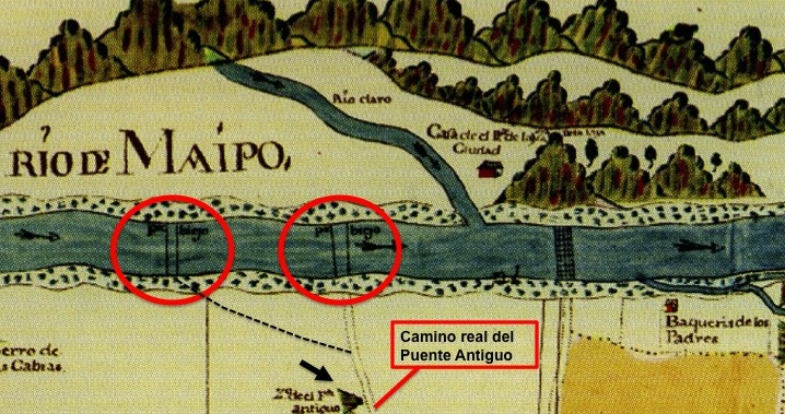 Old Maipo river bridges